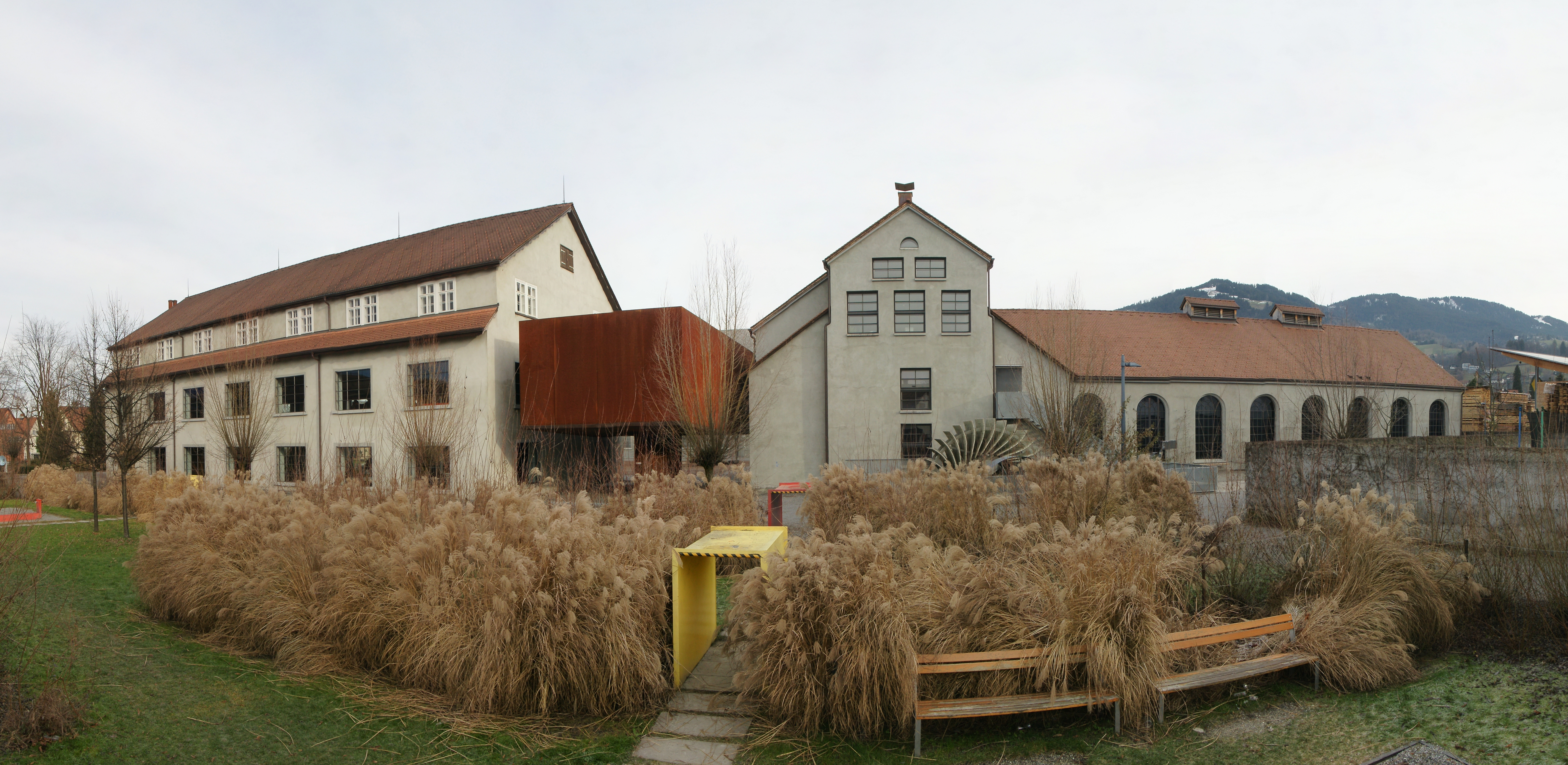 Blick in das Inatura-Areal.